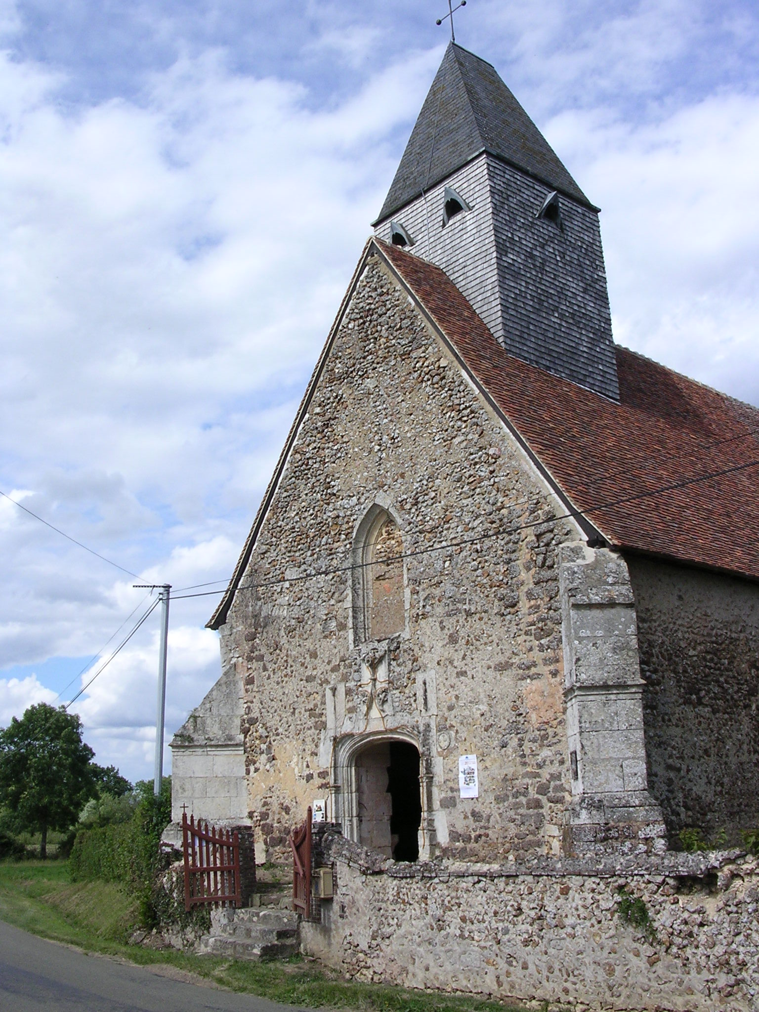 Eglise Notre-Dame de Villevillon